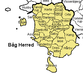 Båg Herred Odense Amt, Denmark.